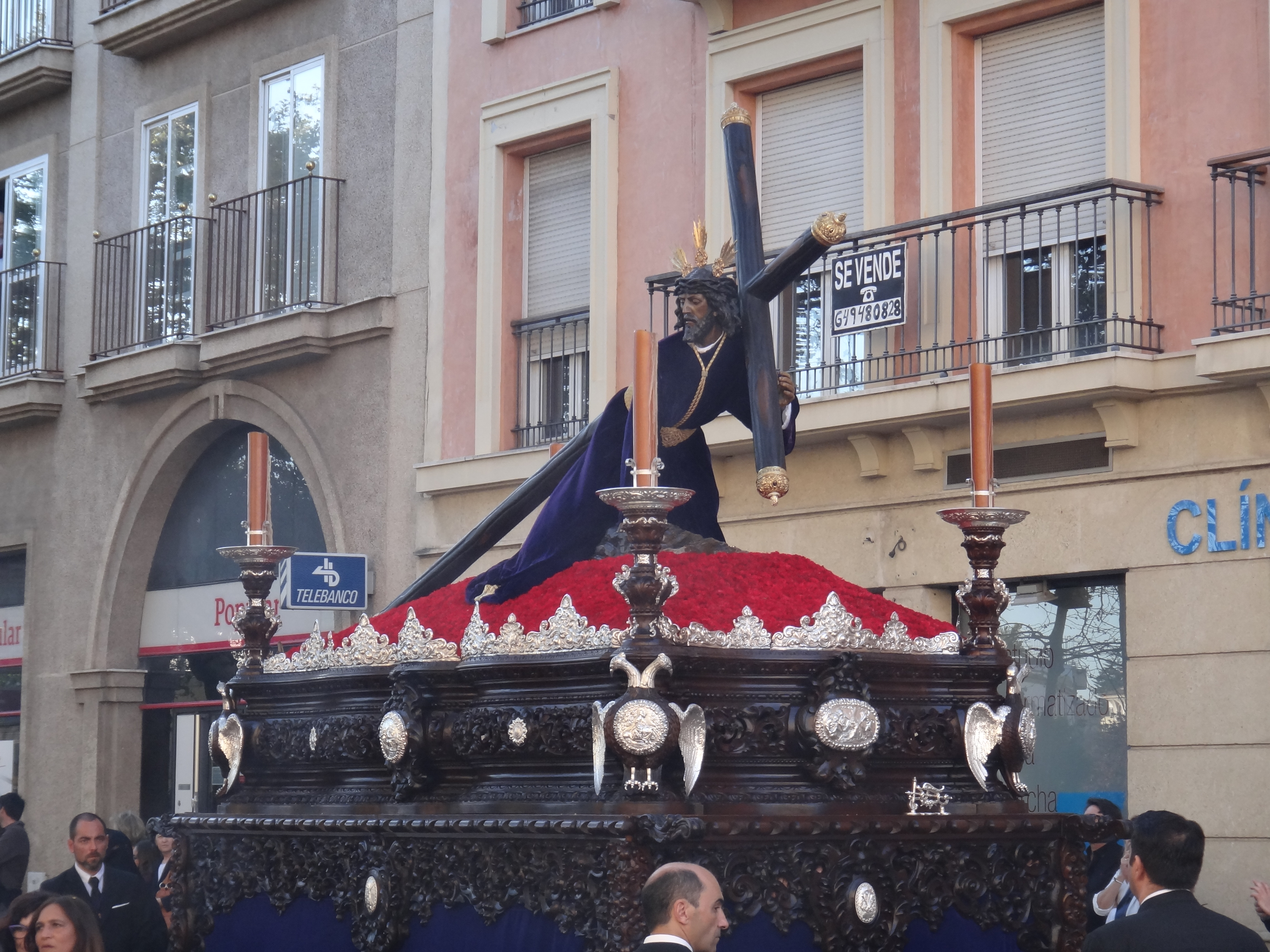 Las Tres Caídas. Semana Santa de Jerez de la Frontera 2015 (Andalucía, España)